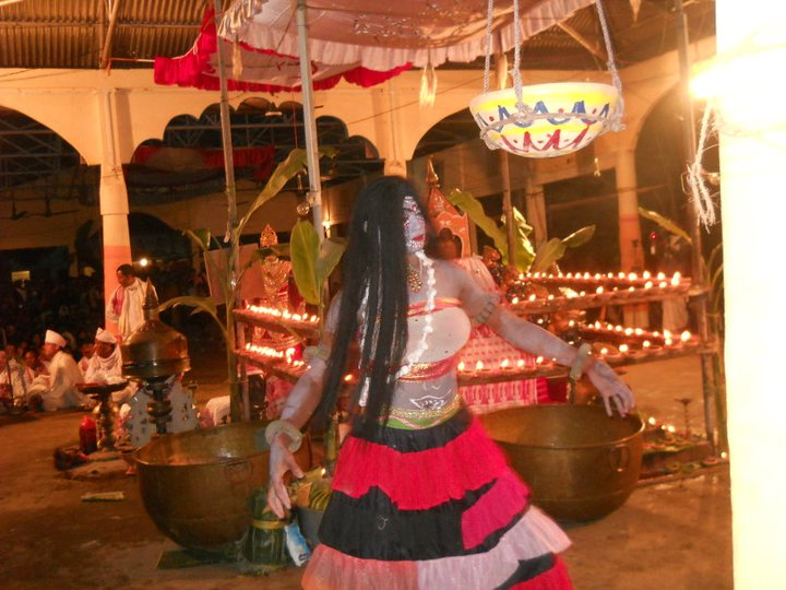 অসমীয়া: ভাওনা সংস্কৃতি_পুতনা ৰাক্ষসী